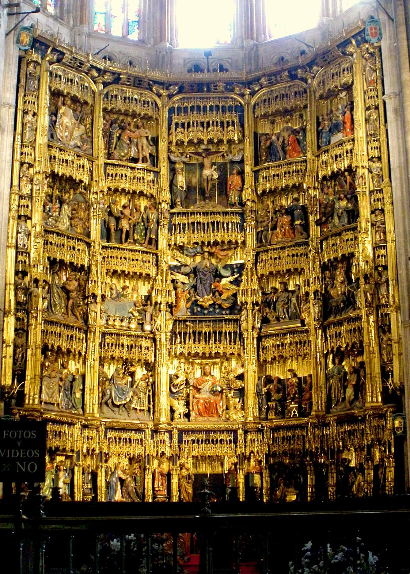 Retablo mayor de la Catedral de Oviedo (Asturias)